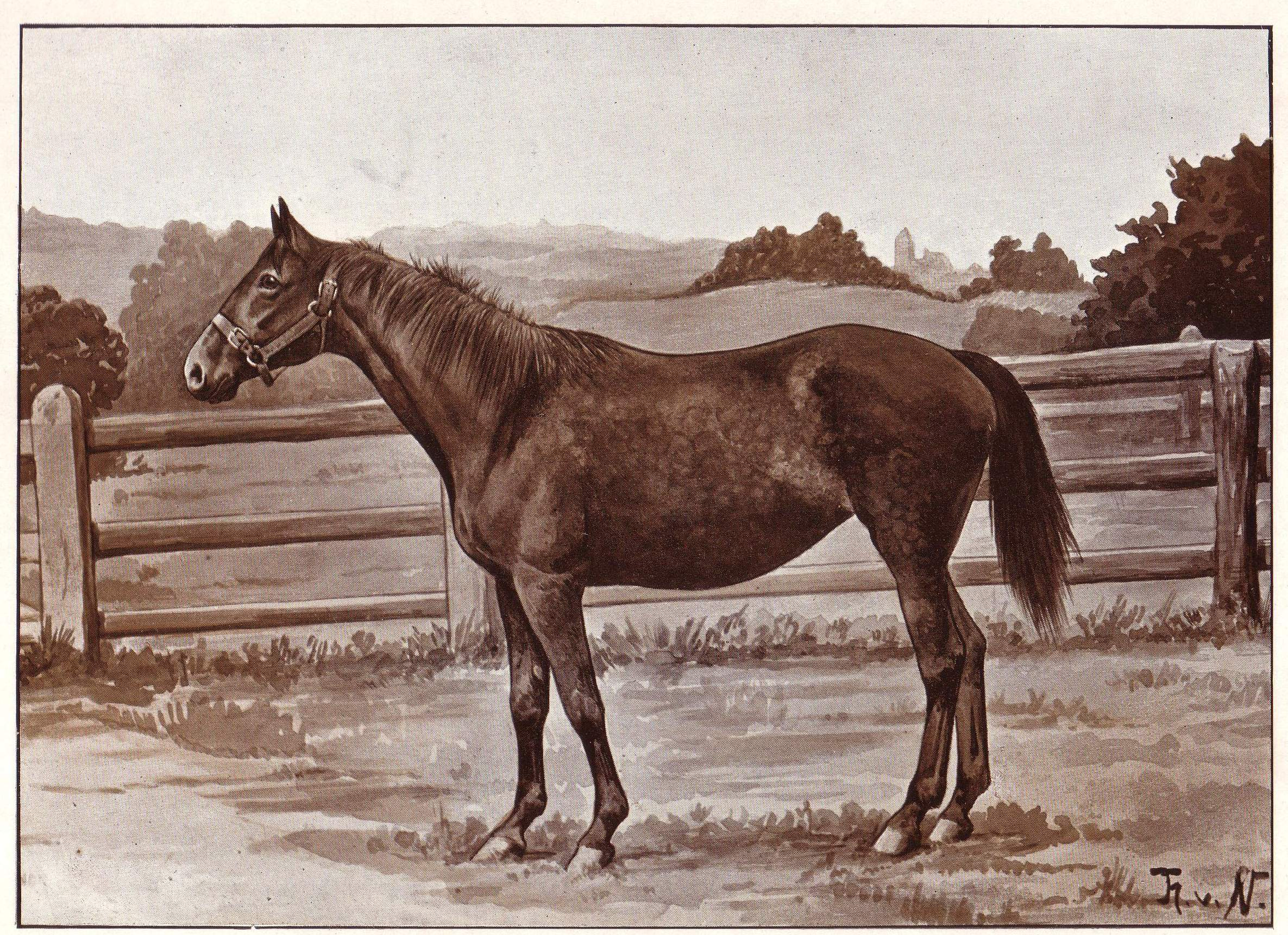 Anglonormanne, Stute "Brie", geb. in Frankreich